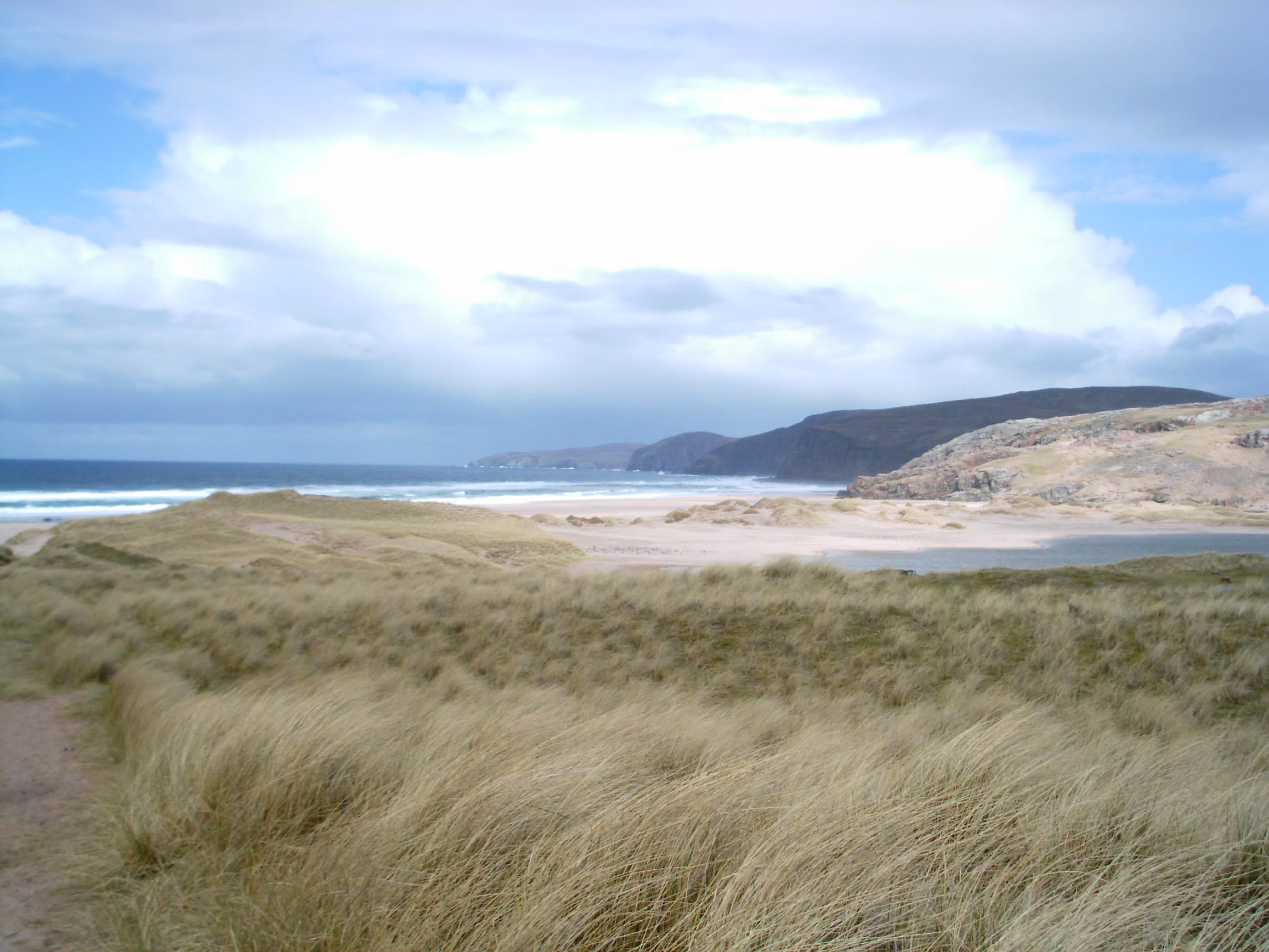 Look over Sandwood Bay